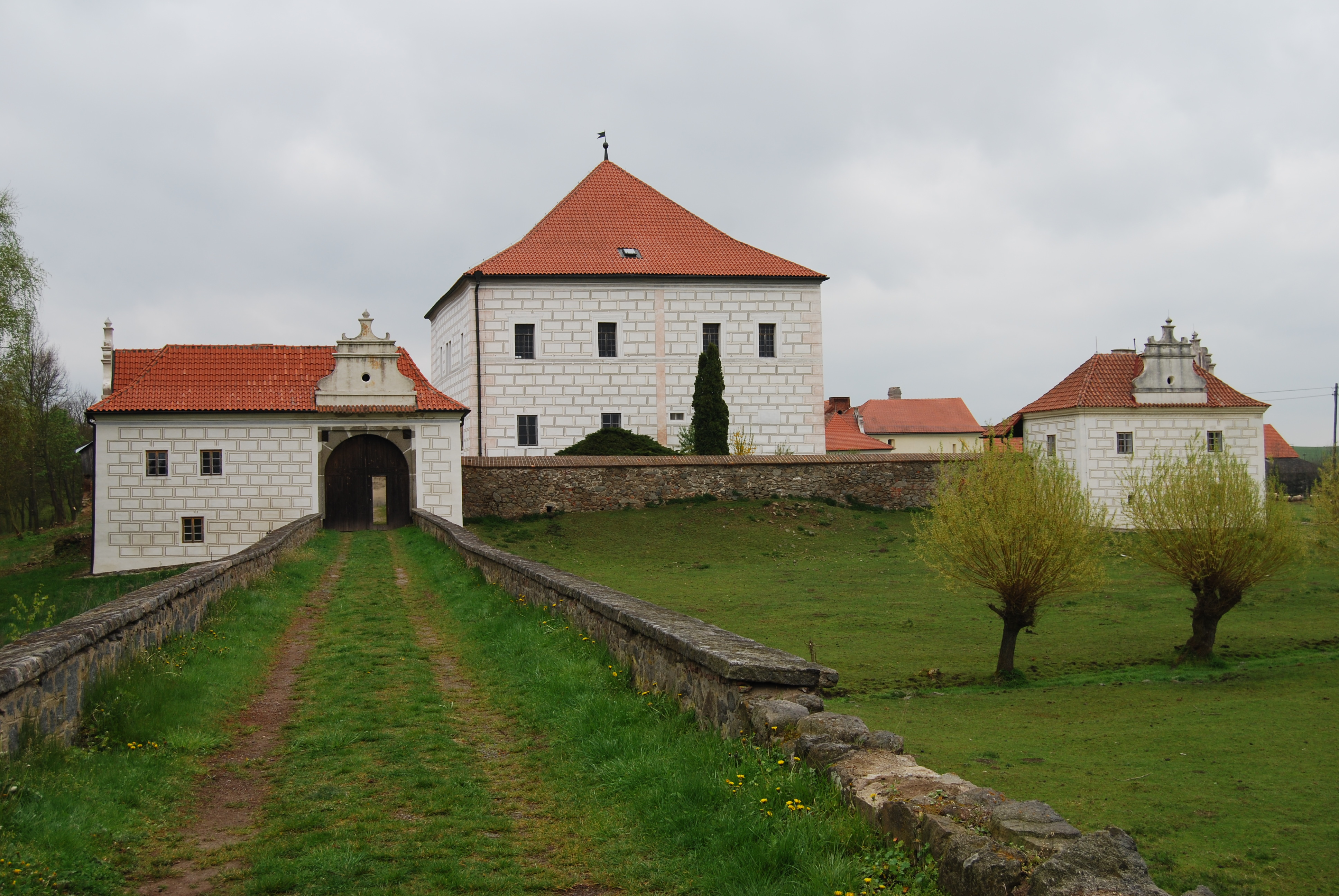 Tvrz. Křepenice na Sedlčansku v okrese Příbram. Česká republika. - Google Maps - Google Earth